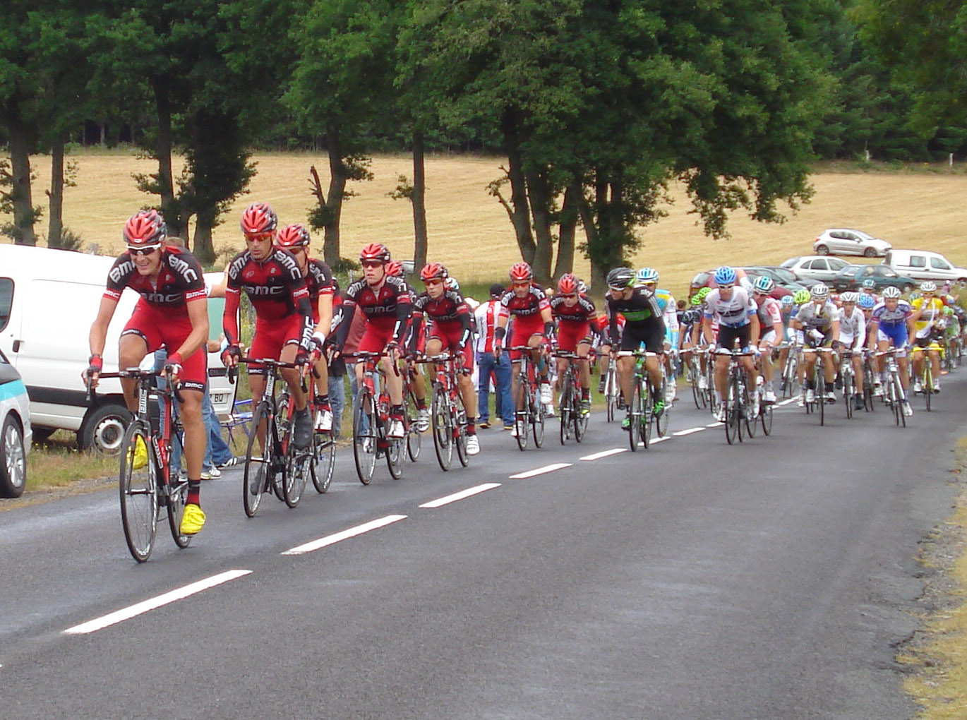 L'équipe BMC en tête de peloton dans l'étape 8 du Tour de France 2011